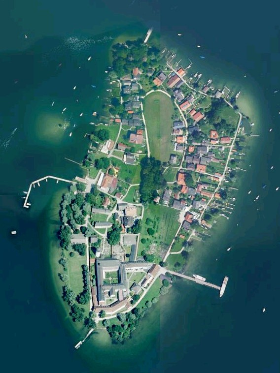 Luftaufnahme der Bayerischen Vermessungsverwaltung: Insel Frauchiemsee im Chiemsee, Bayern.